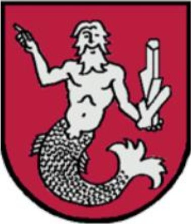 Wappen der Gemeinde Grundlsee, Steiermark, Österreich